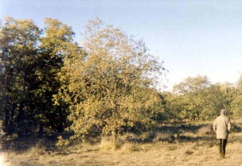 bosque autóctono castilla